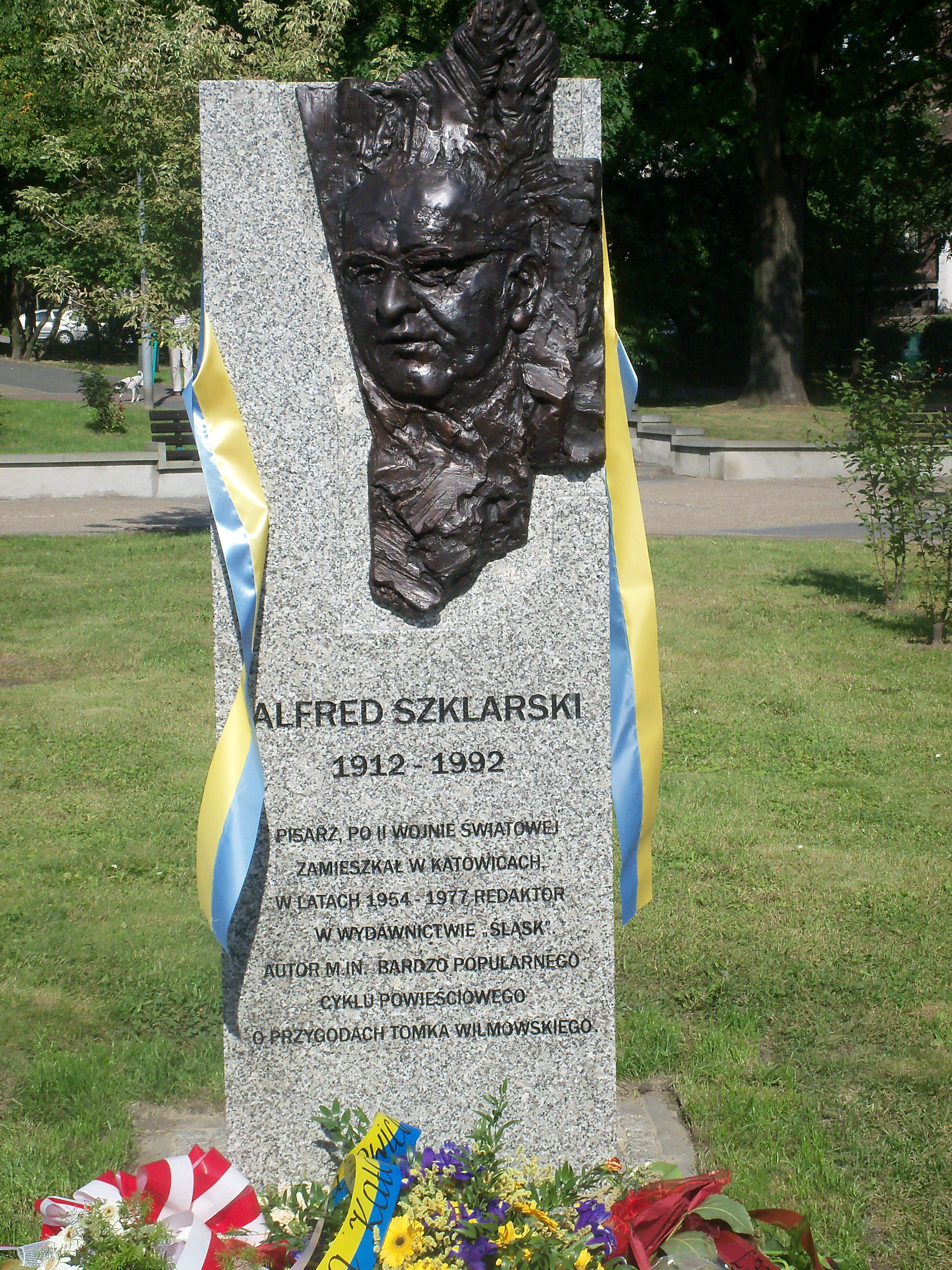 Pamiątkowy obelisk w Galerii Artystycznej na placu Grunwaldzkim w Katowicach, przedstawiający pisarza Alfreda Szklarskiego.